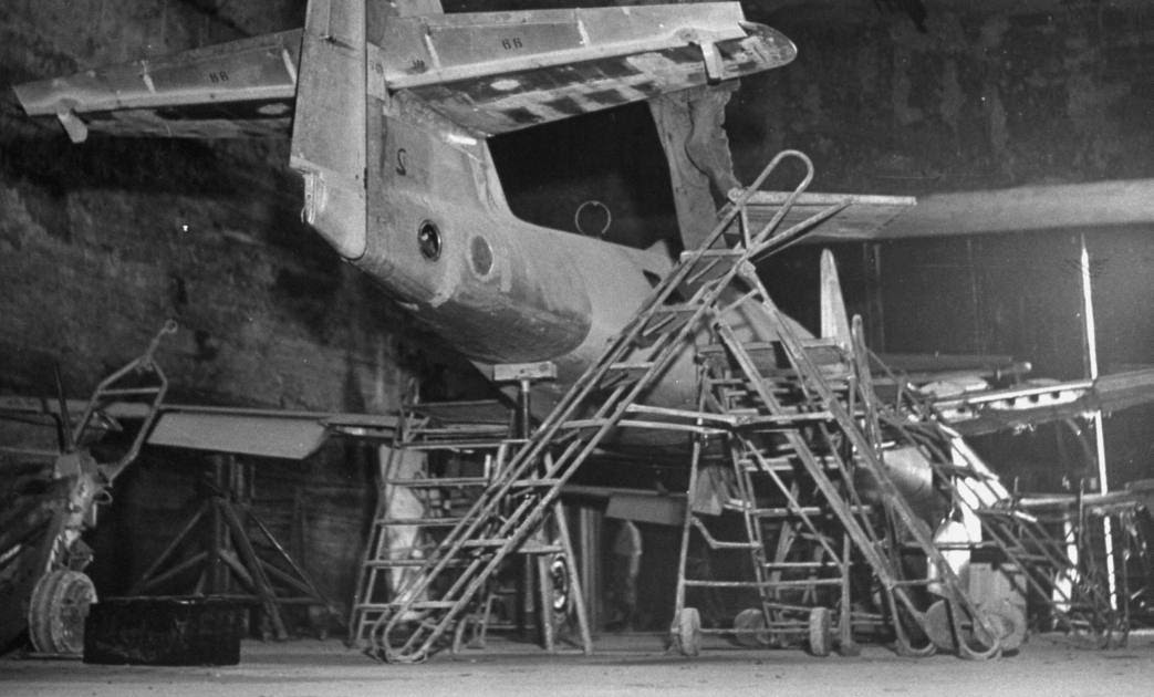 Unterirdische Produktion von Me 262 Kahla / Thüringen.- Unterirdische Rüstungsproduktion von Düsenjägern Messerschmitt Me 262 in den REIMAHG-Rüstungswerken